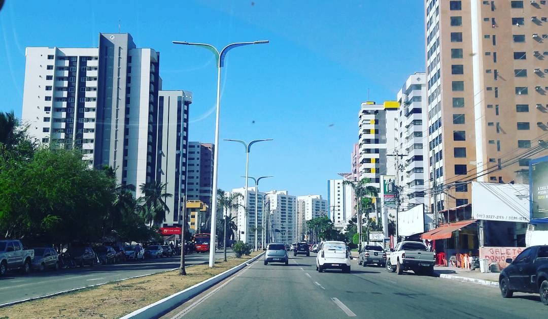 Avenida dos Holandeses - São Luís Maranhão